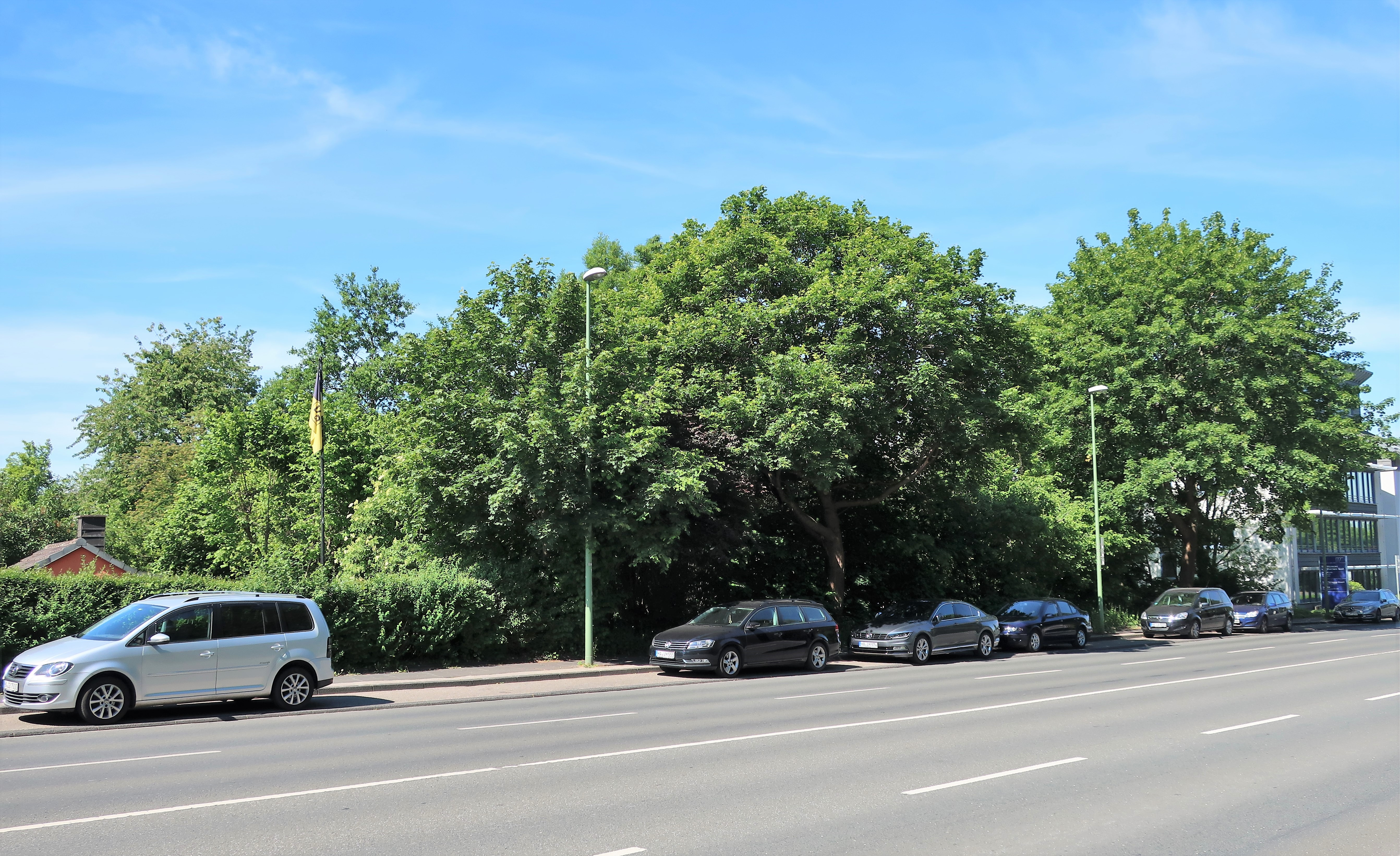 Geschützter Landschaftsbestandteil 1.4.2.24 „Feuchtwiese Loxbaum“ in Hagen, südwestlich der Feithstraße. Es handelt sich um eine Feuchtwiese mit einem kleinen Tümpel, einem kleinen Bachlauf und randständigen Gehölze.